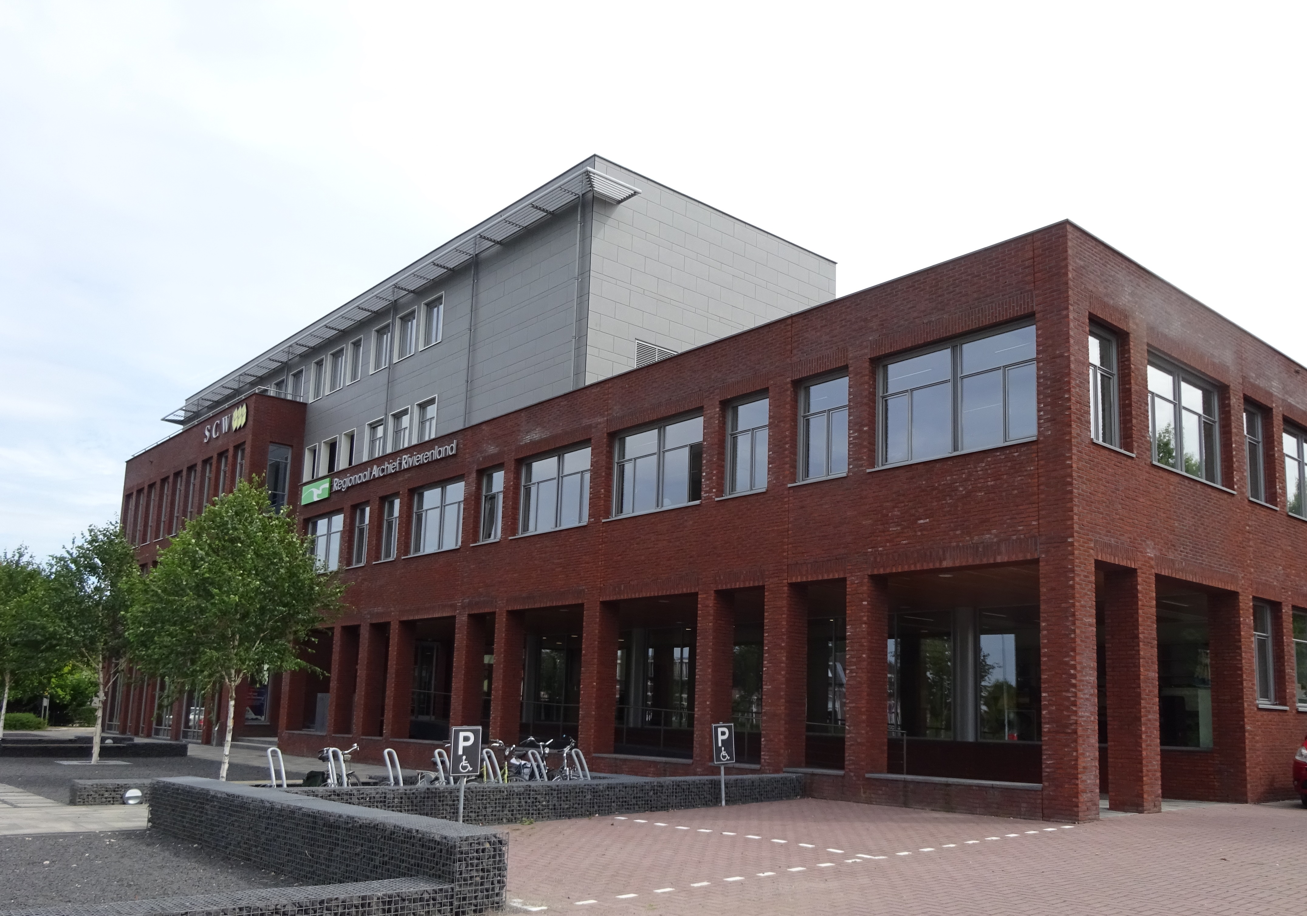 Regionaal Archief Rivierenland